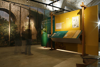 Vista de l'exposició La Sèquia i l'Aigua